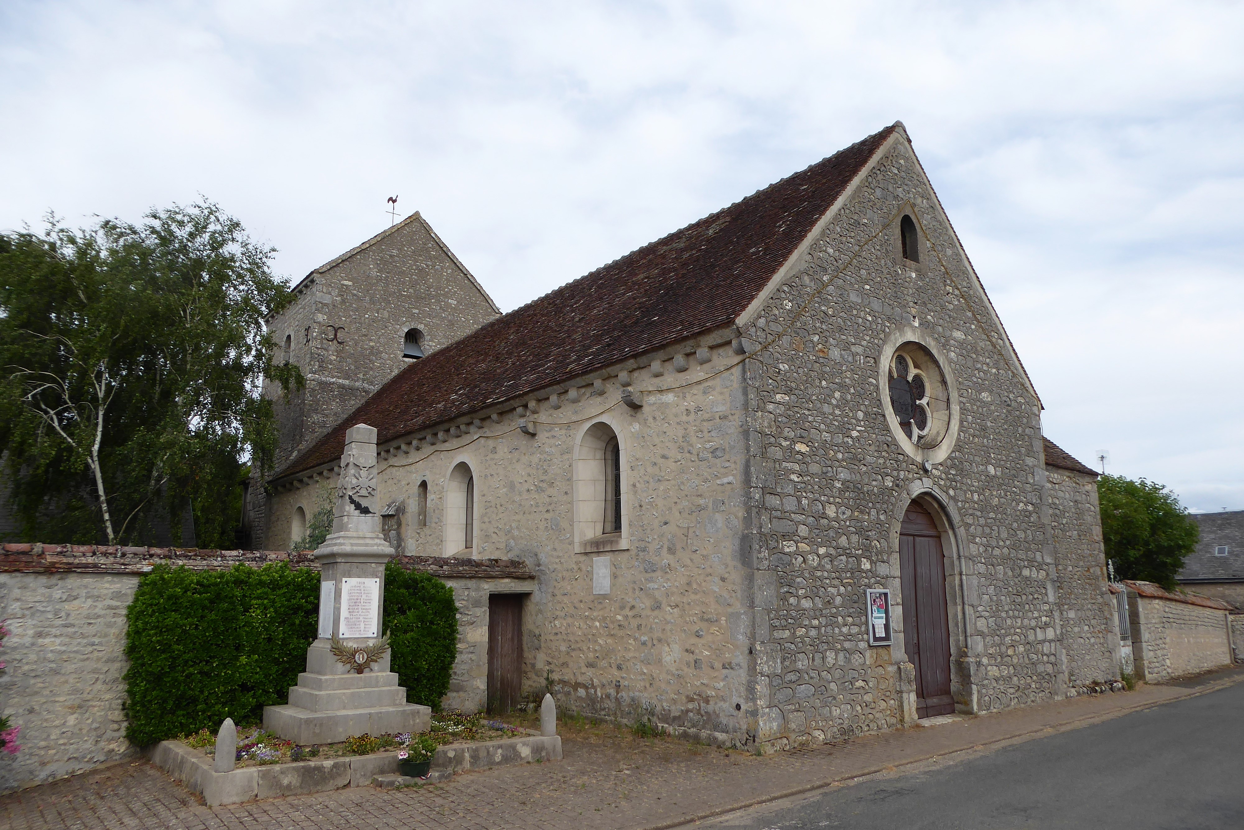 église Saint-Cyr-Sainte-Julitte et monument aux morts de Fontenay-sur-Conie, Eure-et-Loir, France.